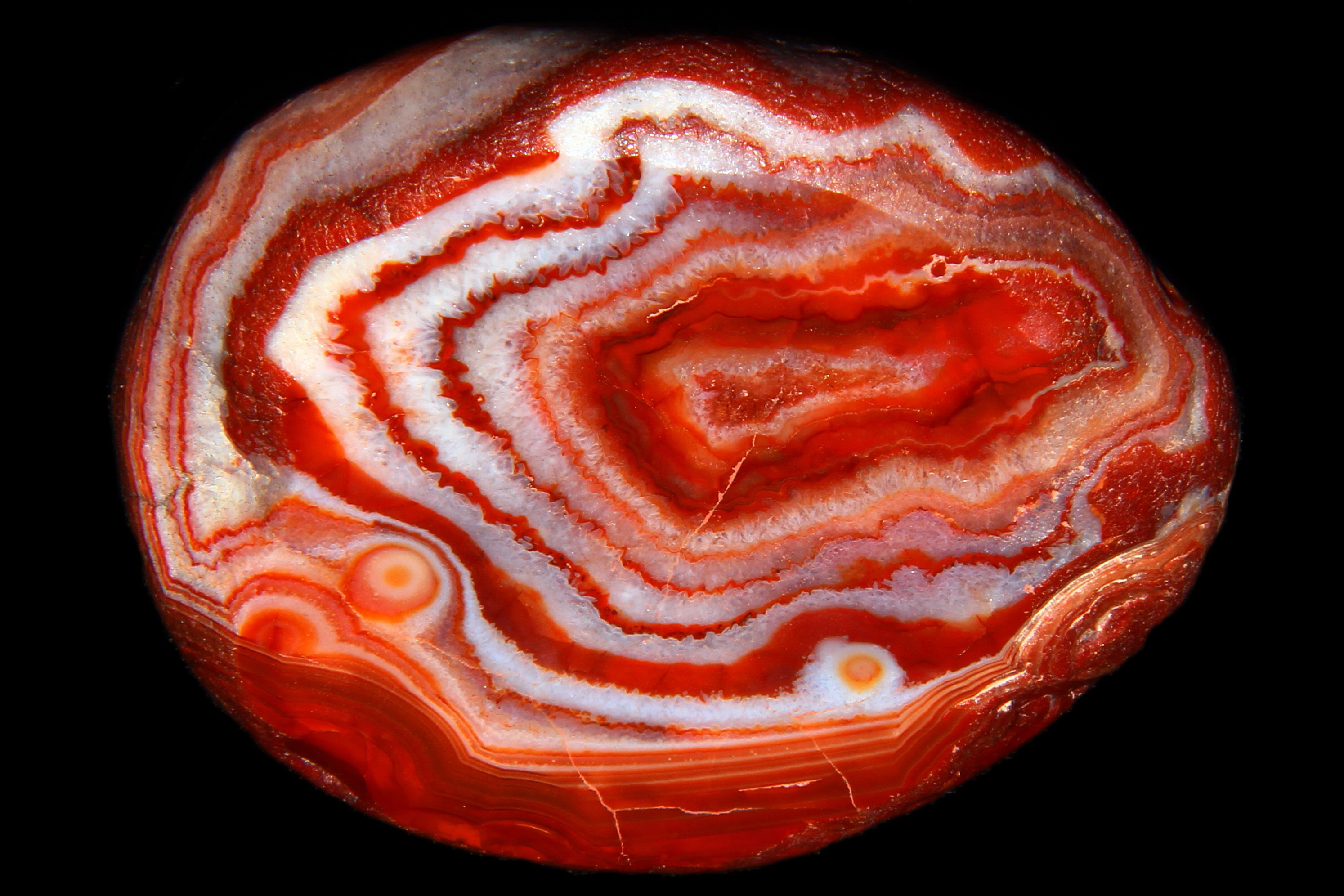 Agat Lake Superior - Duluth, Minnesota, USA.